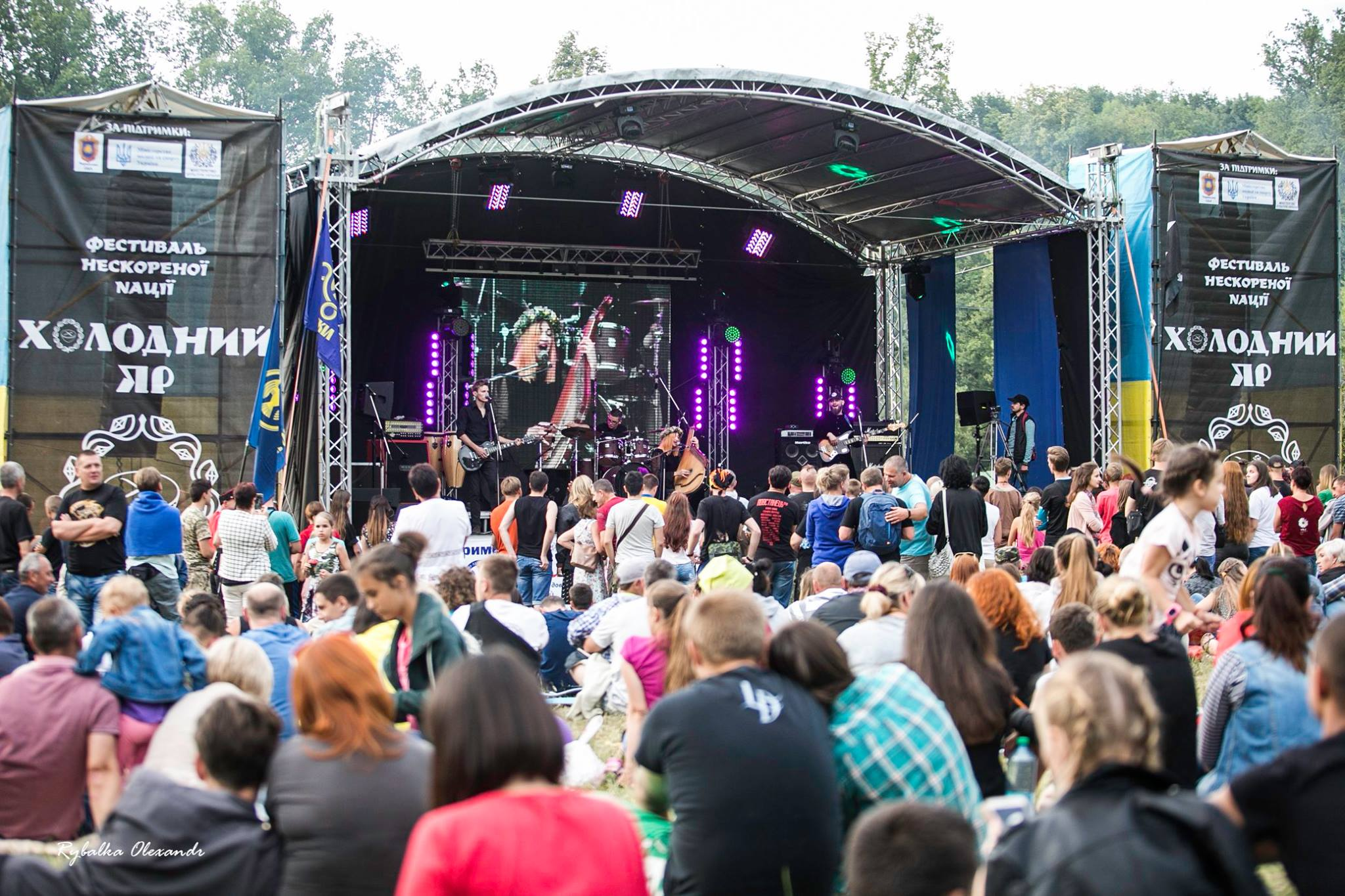 Фестиваль 2017